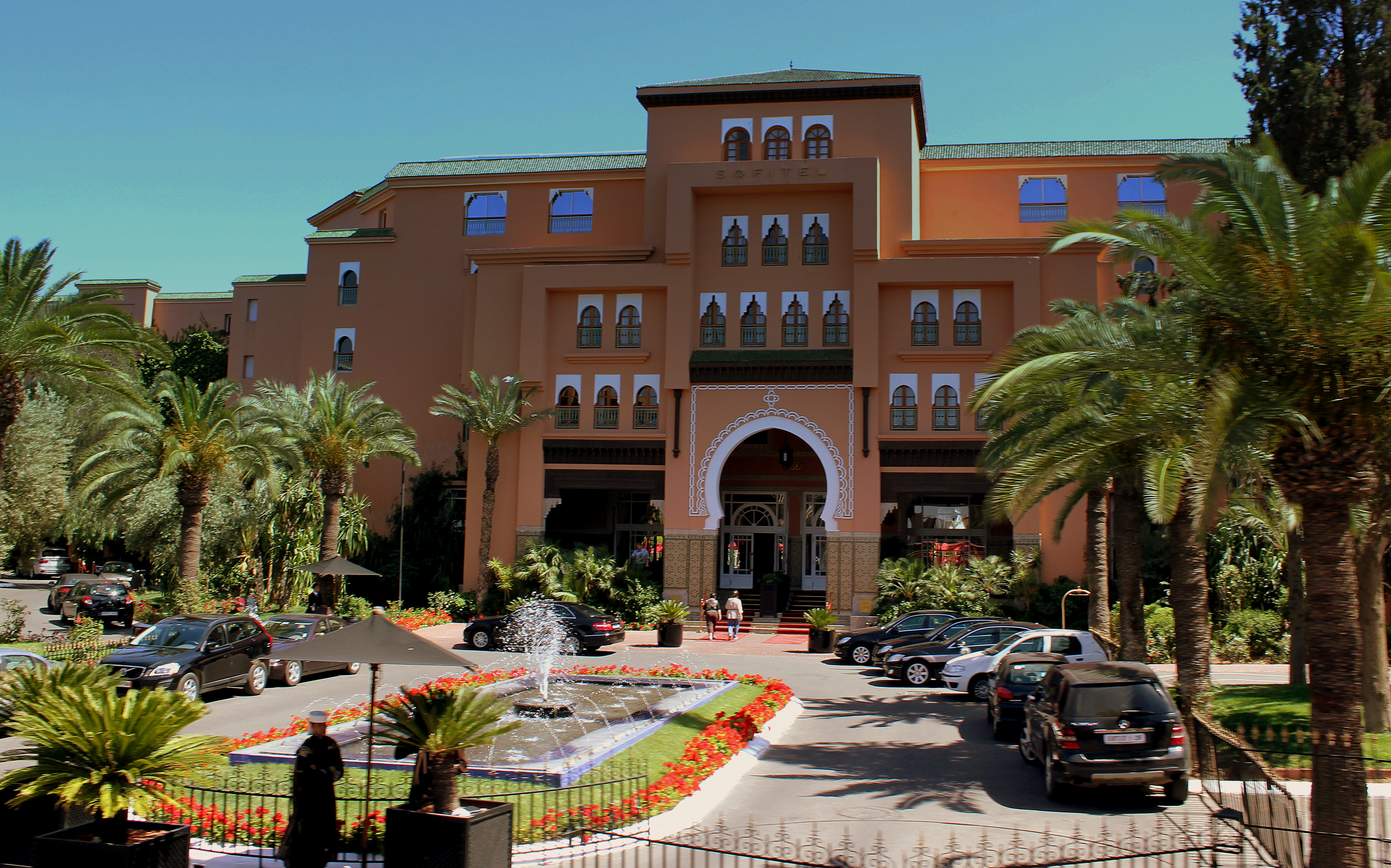 SOFITEL HOTEL MARRAKECH MOROCCO APRIL 2013